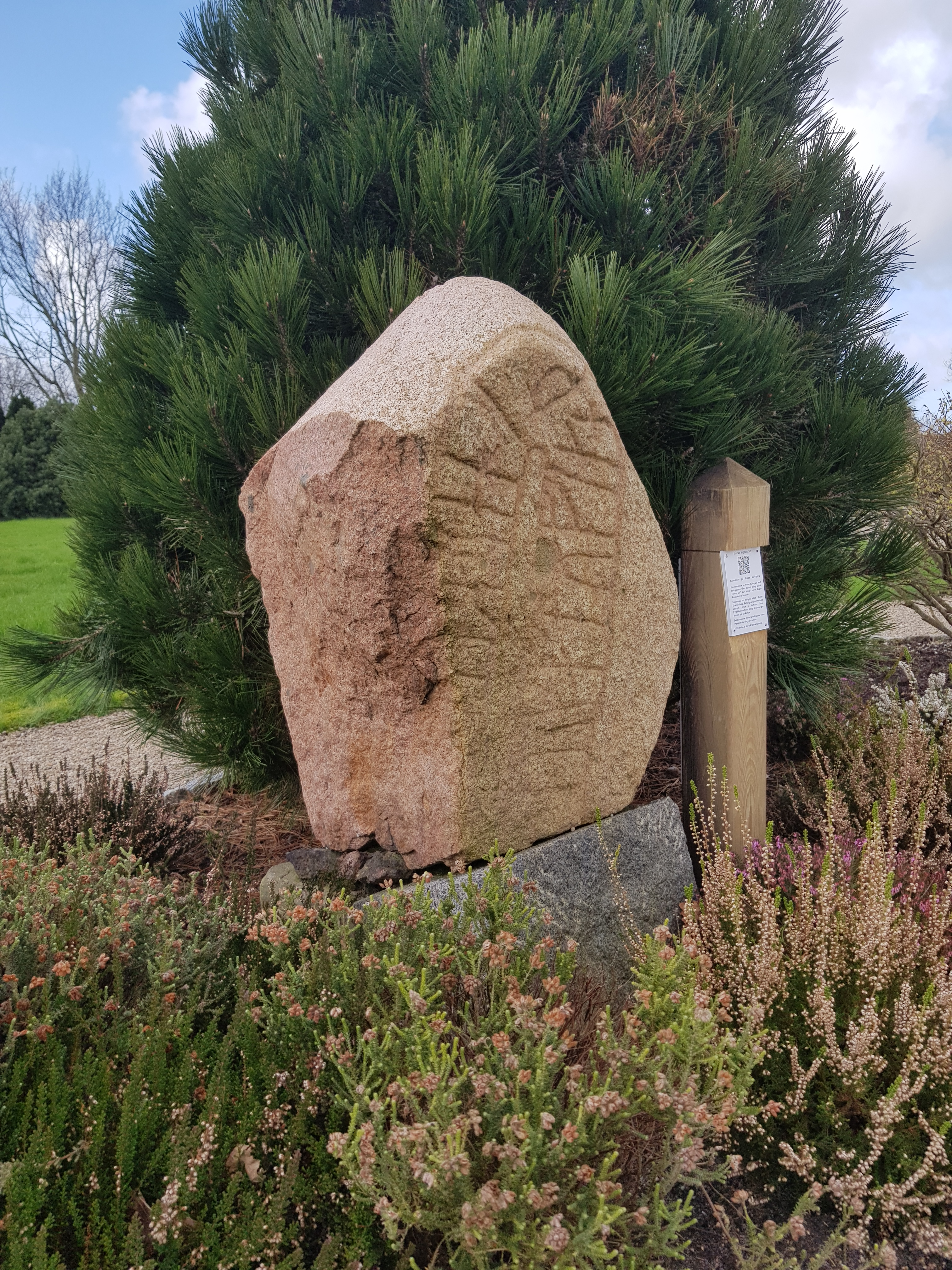 Hornestenen syd for kirken på Horne Kirkegård